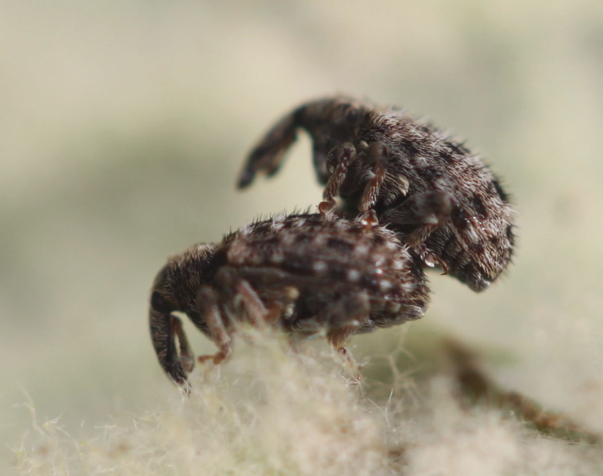 Rüsselkäfer Cleopus solani am 22. Februar 2020 an Königskerze nahe Rheinufer südlich Mannheim